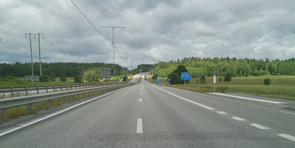 Väg 276 vid Stava backe i riktning mot Rosenkälla Juli 2020